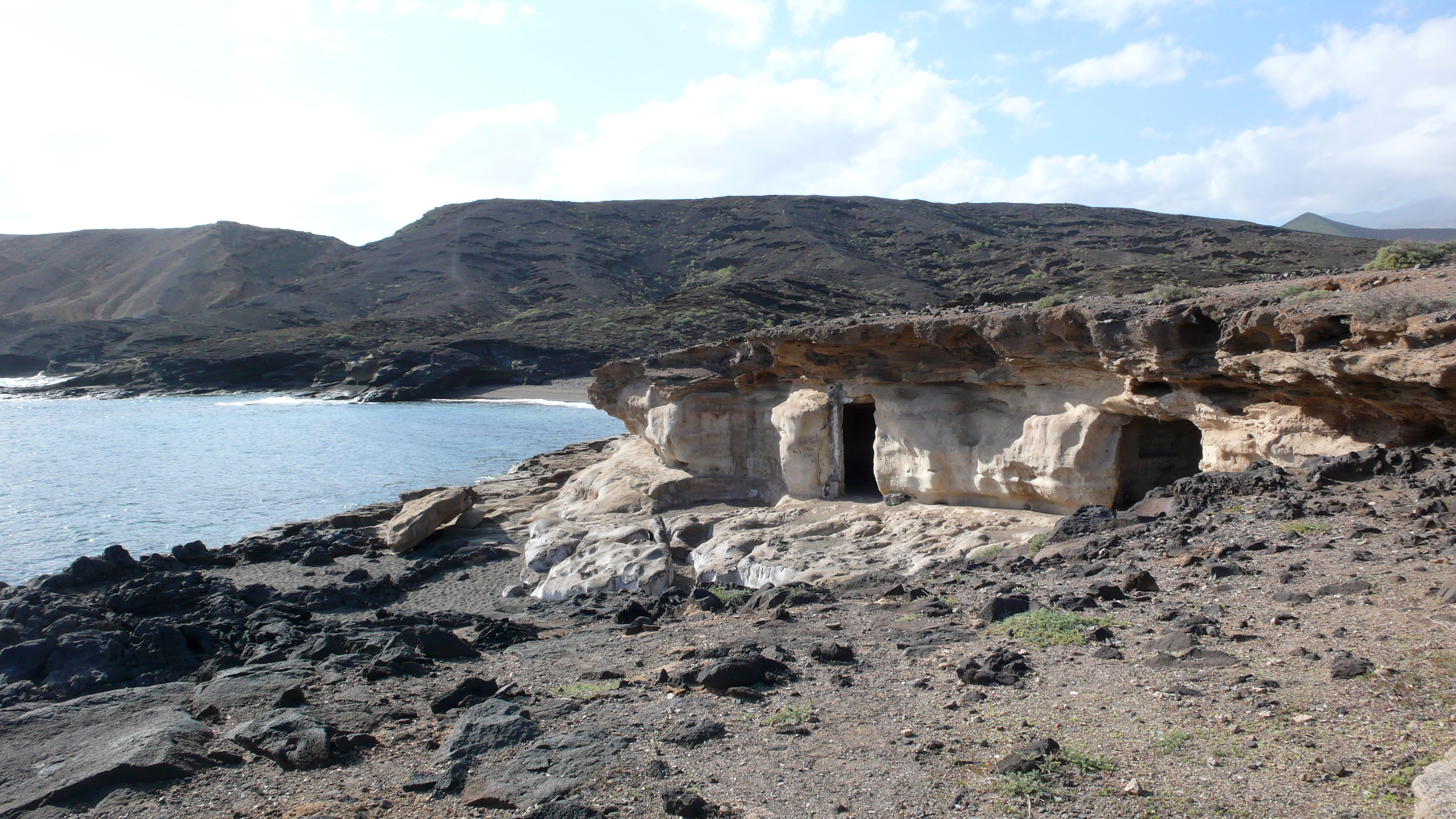 Monumento Natural Montaña Pelada. Puntilla de las Cuevas del Trigo. Granadilla de Abona.